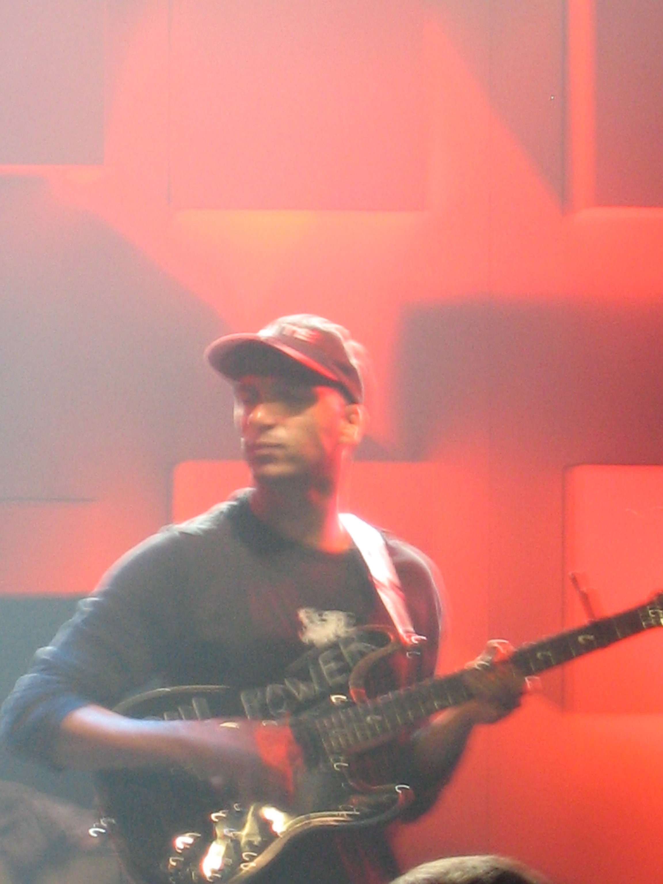 Tom Morello